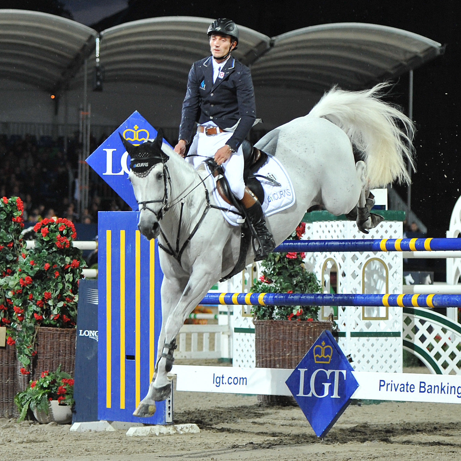 Vienna Masters am 21. September 2013 Longines Global Champions Tour Stefan Eder (AUT) auf Chilli van Dijk NRW